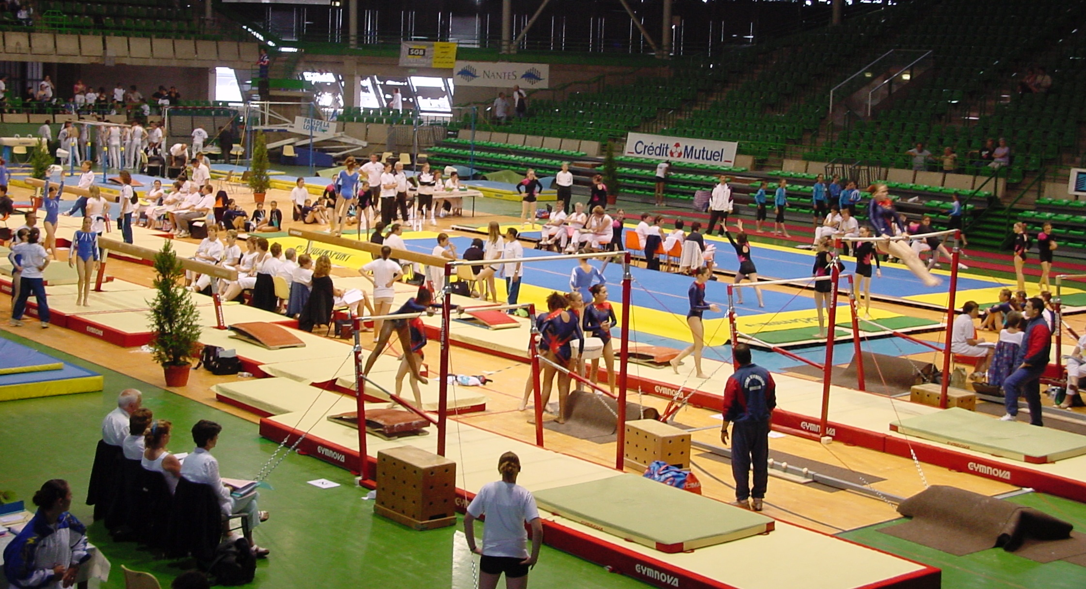 Salle de gymnastique